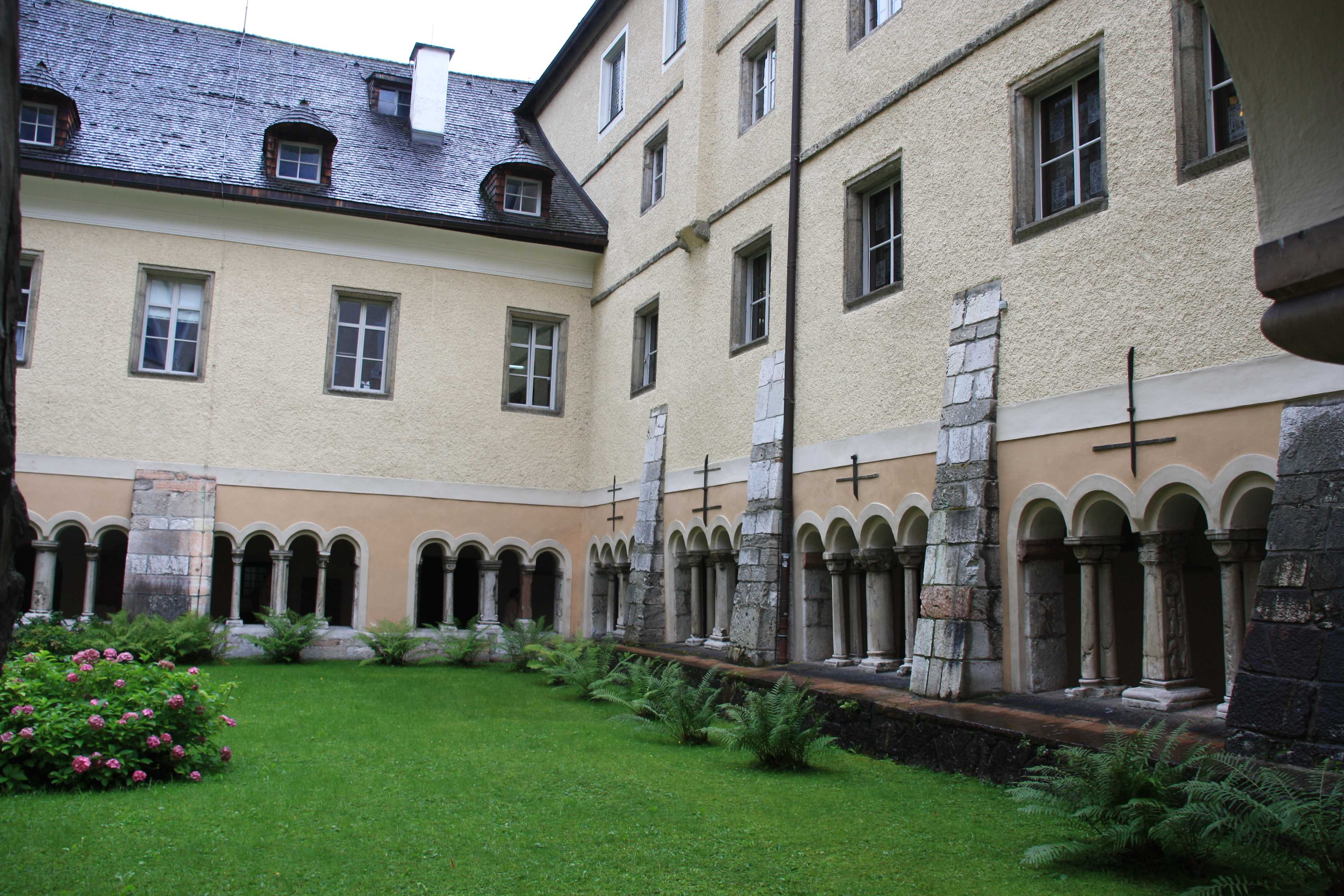 Der Innenhof des Königlichen Schlosses Berchtesgaden, Kreuzgang des ehemaligen Augustiner-Chorherrenstiftes St. Peter und Johannes der Täufer